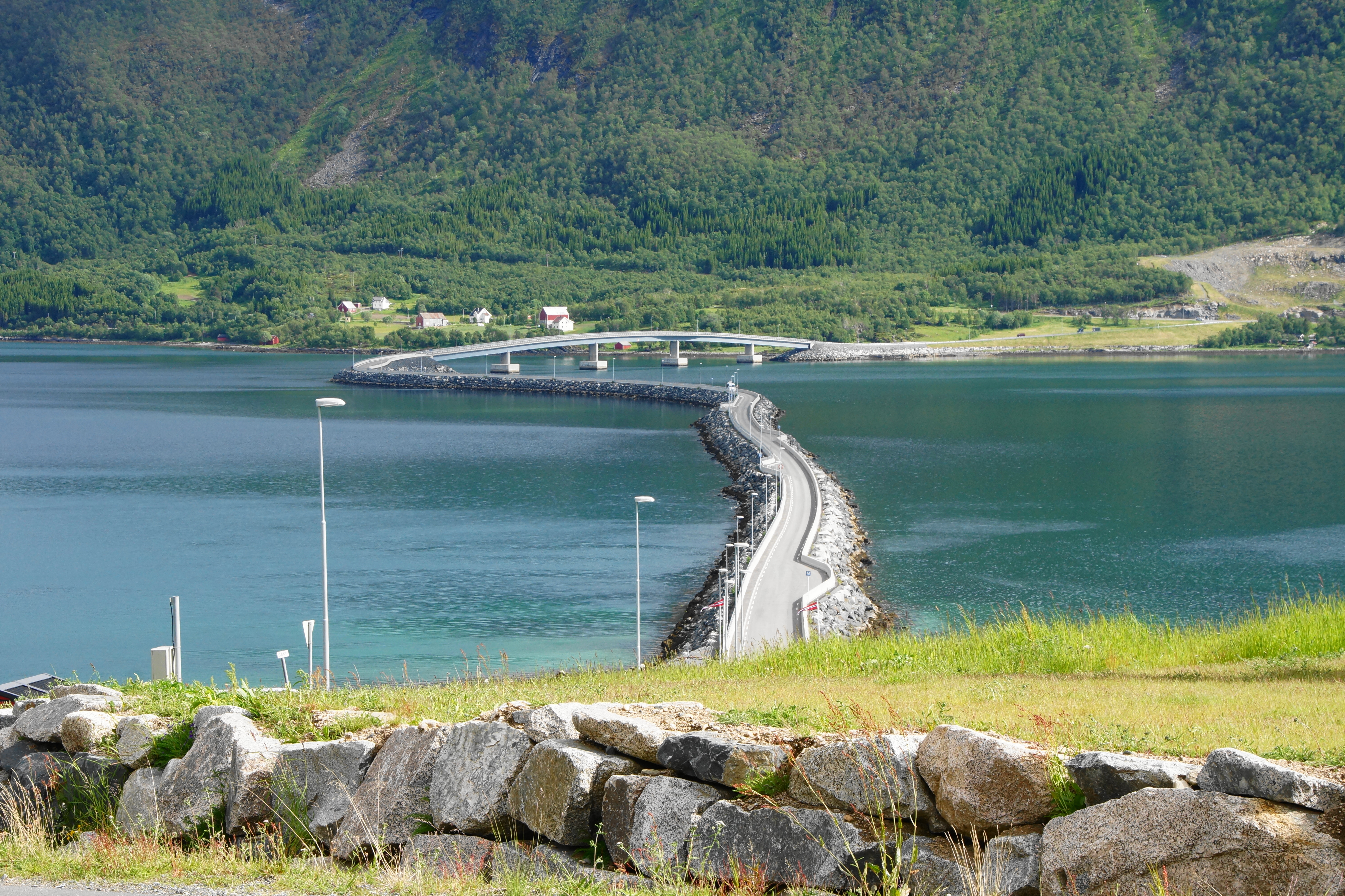 Kveøybrua bridge in Kvæfjord, Norway seen from Kveøya island towards Hinnøya island.